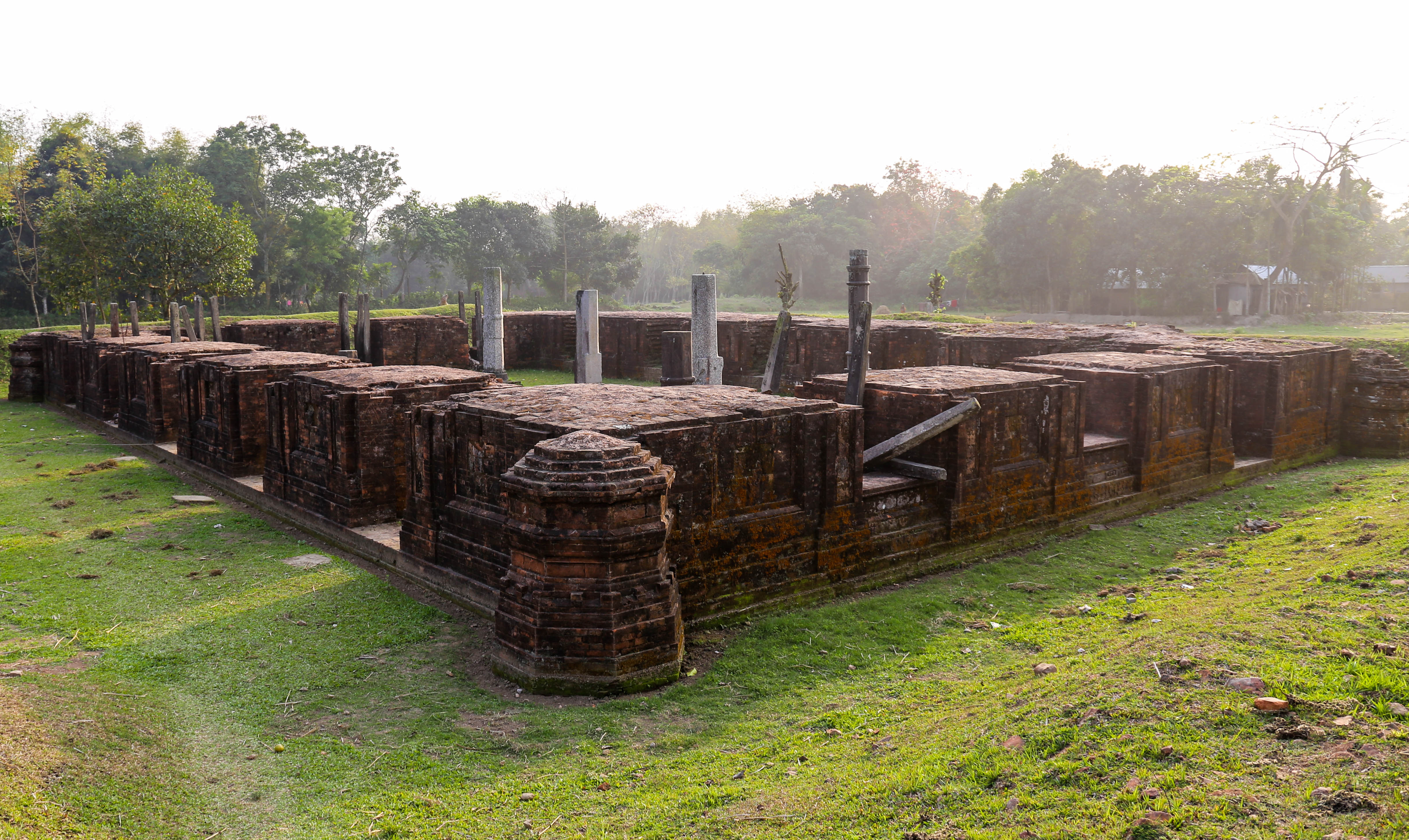 কেন্দুয়া উপজেলা সদর থেকে ৭ কিলোমিটার দূরে রোয়াইল বাড়ি গ্রাম। এ গ্রামেই রোয়াইল বাড়ি দুর্গ নির্মাণ করেন নসরত শাহ।